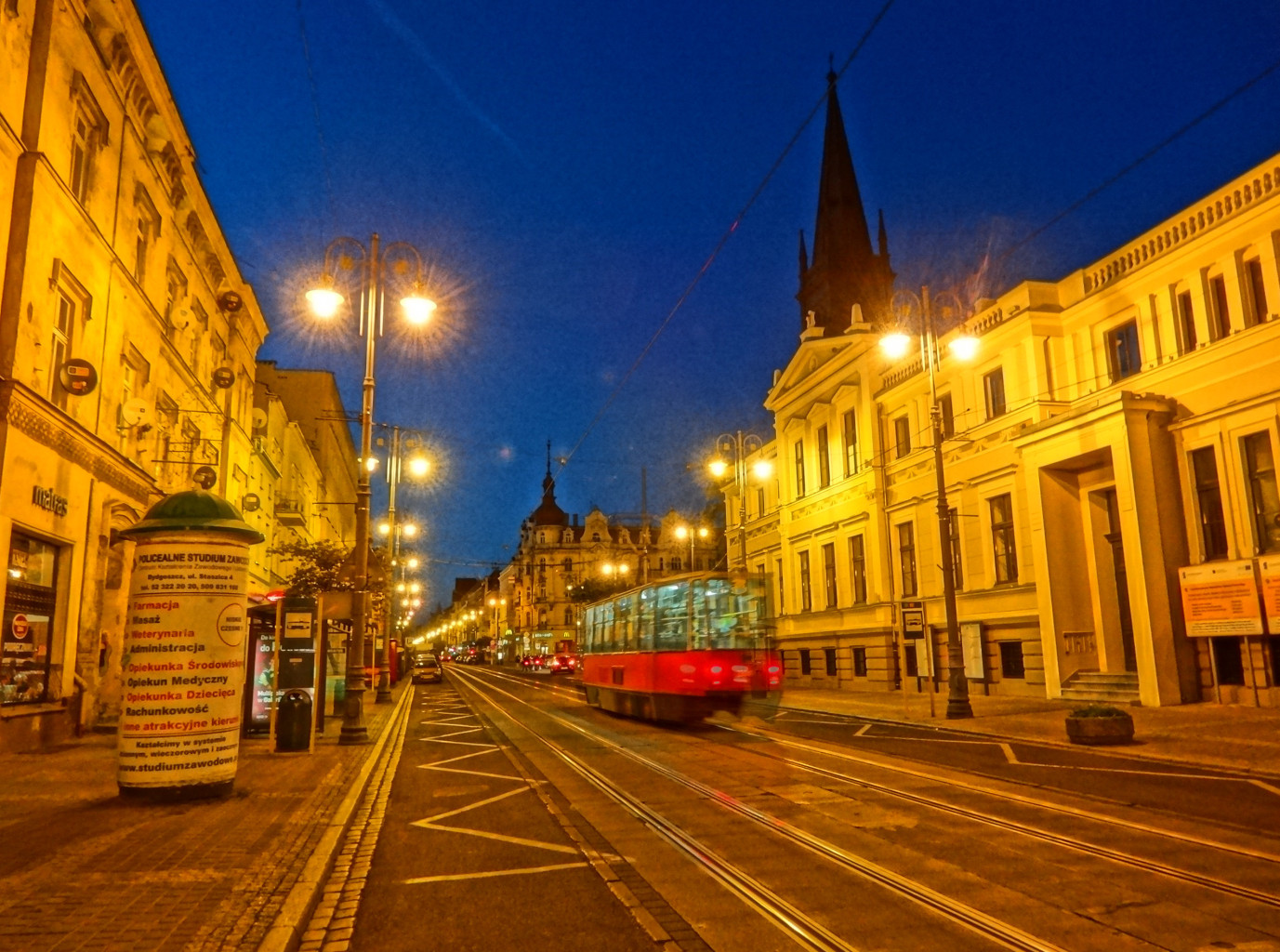 Ulica Gdańska w Bydgoszczy